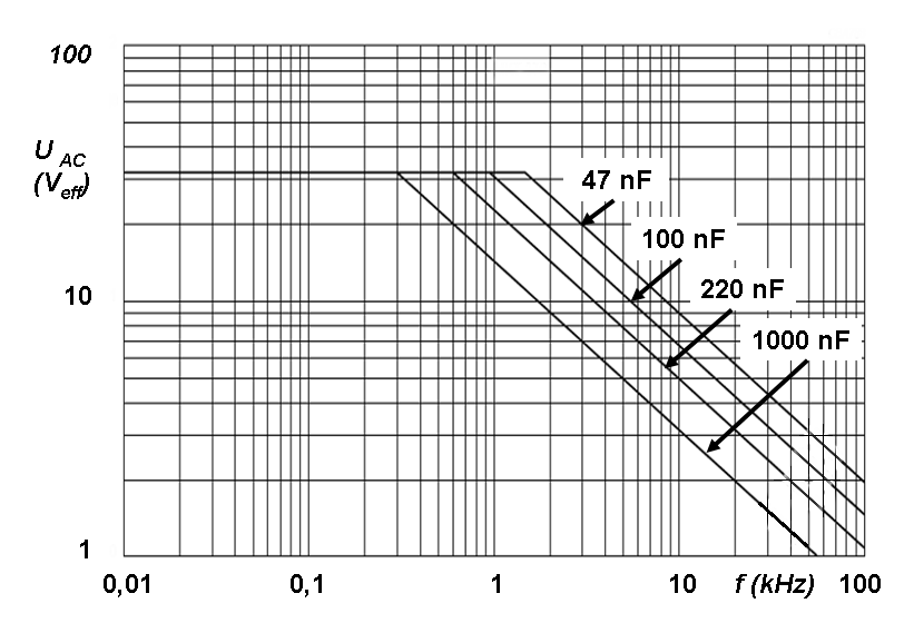 Zulässige Wechselspannung in Abhängigkeit von der Frequenz bei Folkos